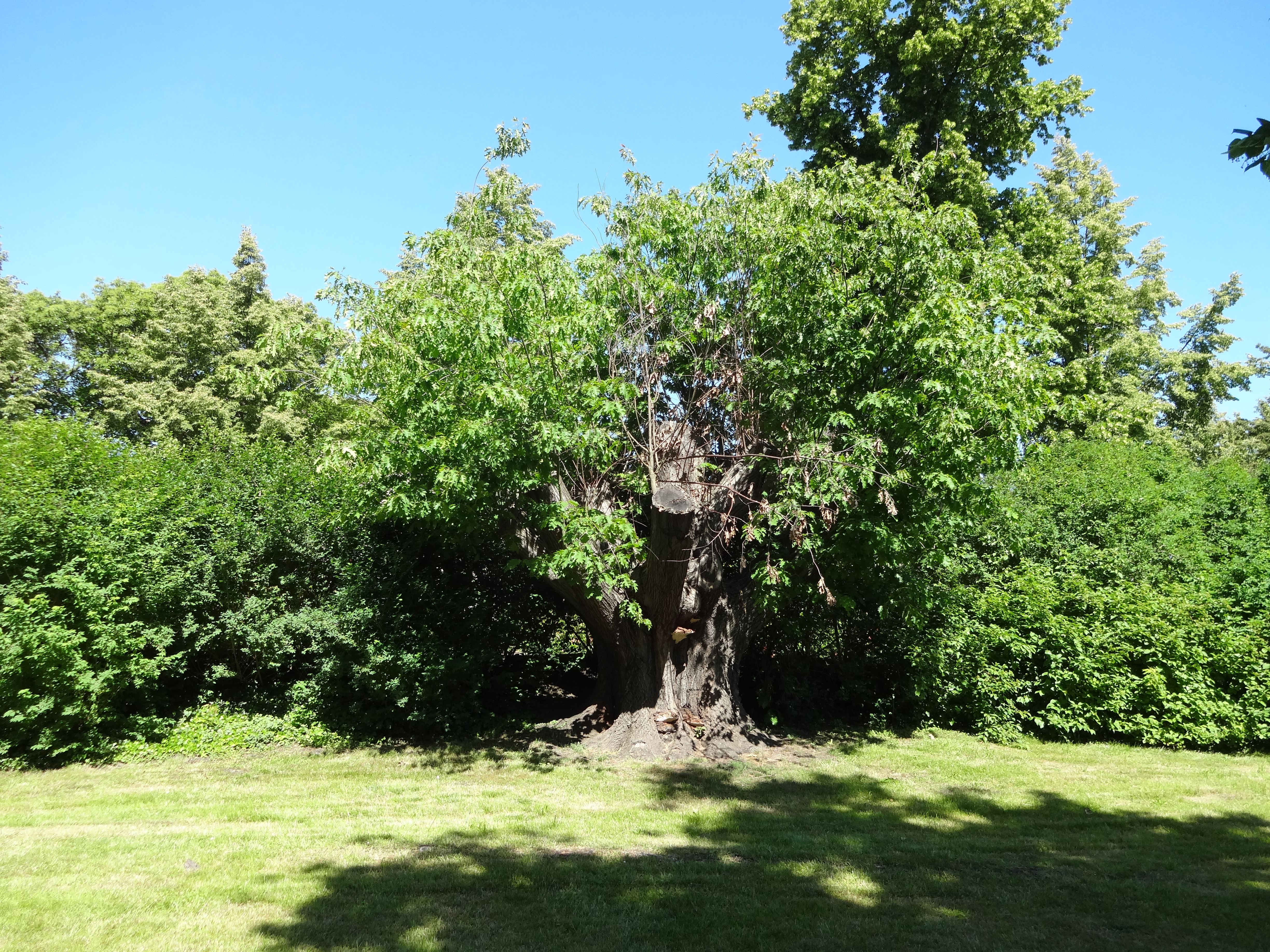 Naturdenkmal in Senftenberg Nr. 0100-4; Roteiche (Quercus rubra); Standort 50 Meter südwestlich vom Jahndenkmal; ältester Baum im Schlosspark; Alter zirka 115 Jahre